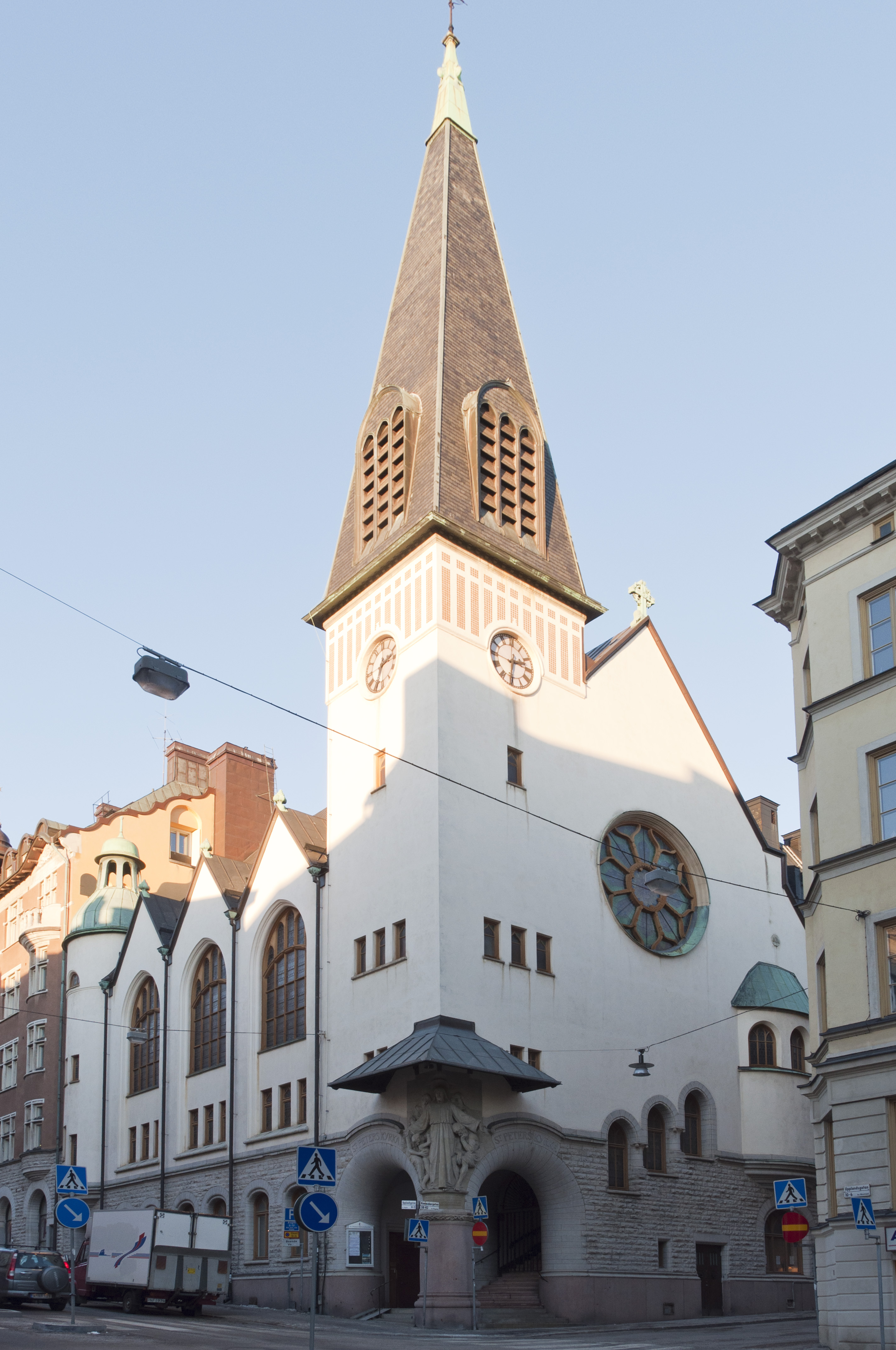 Sankt Peterskyrkan